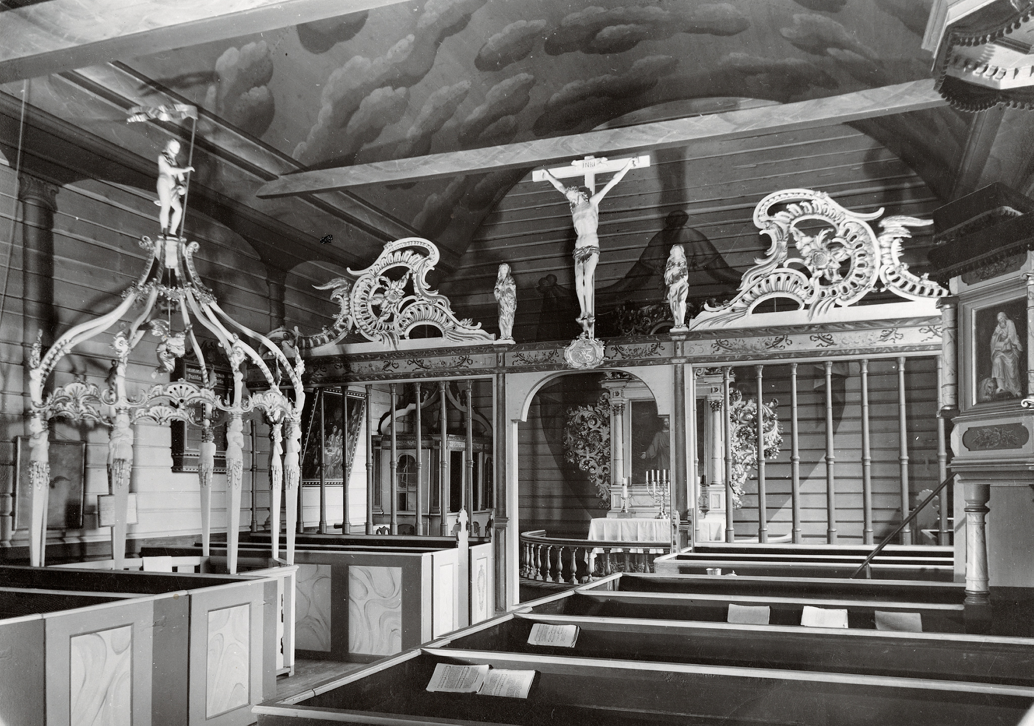 Interiør i Holt kirke. Foto: Teigens Fotoatelier, fra Kulturminnebilder.no.